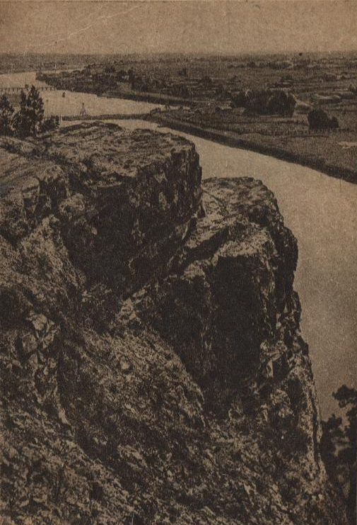 Вид на село Курьи со скалы Чёртов стул